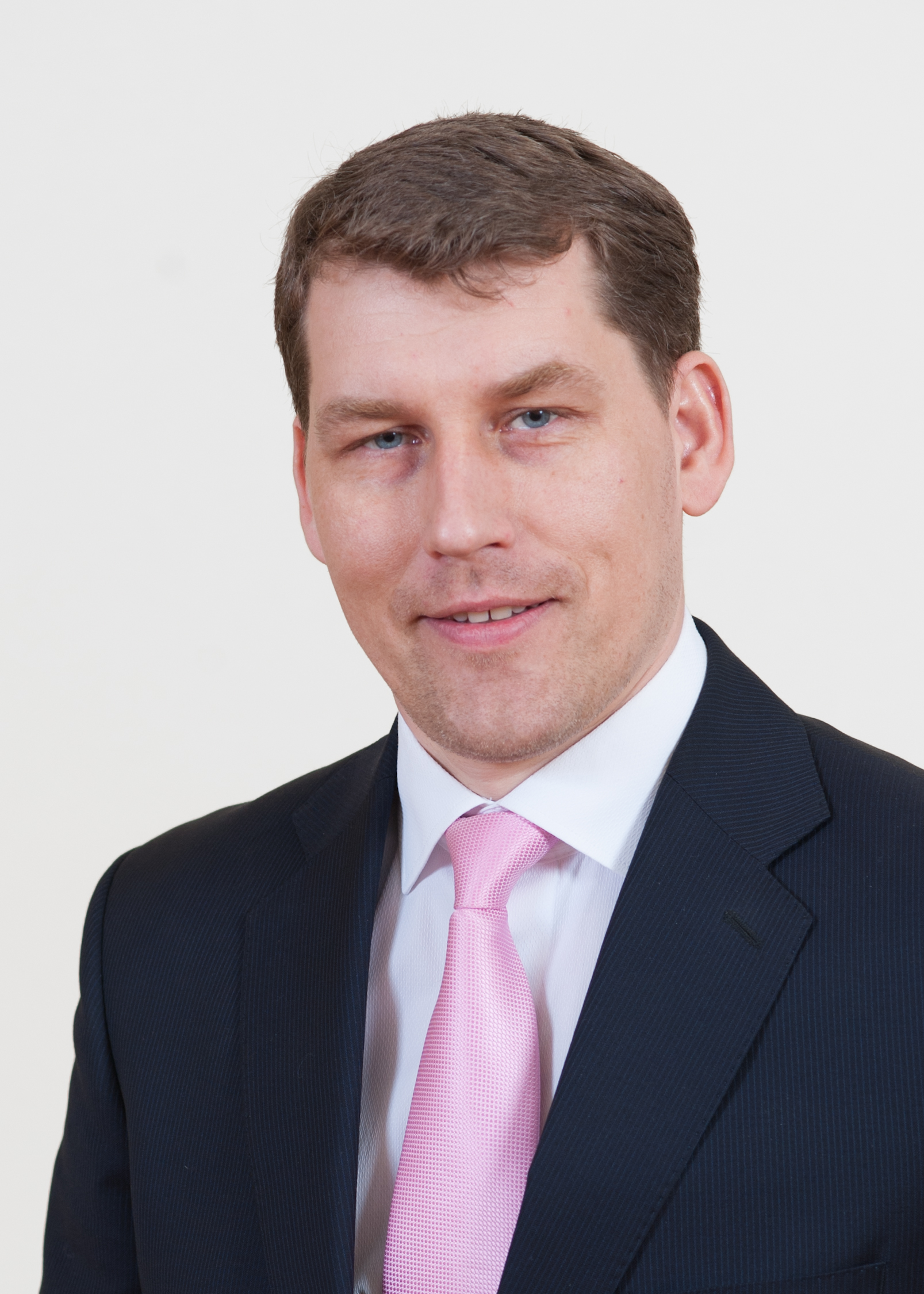 Andres Metsoja